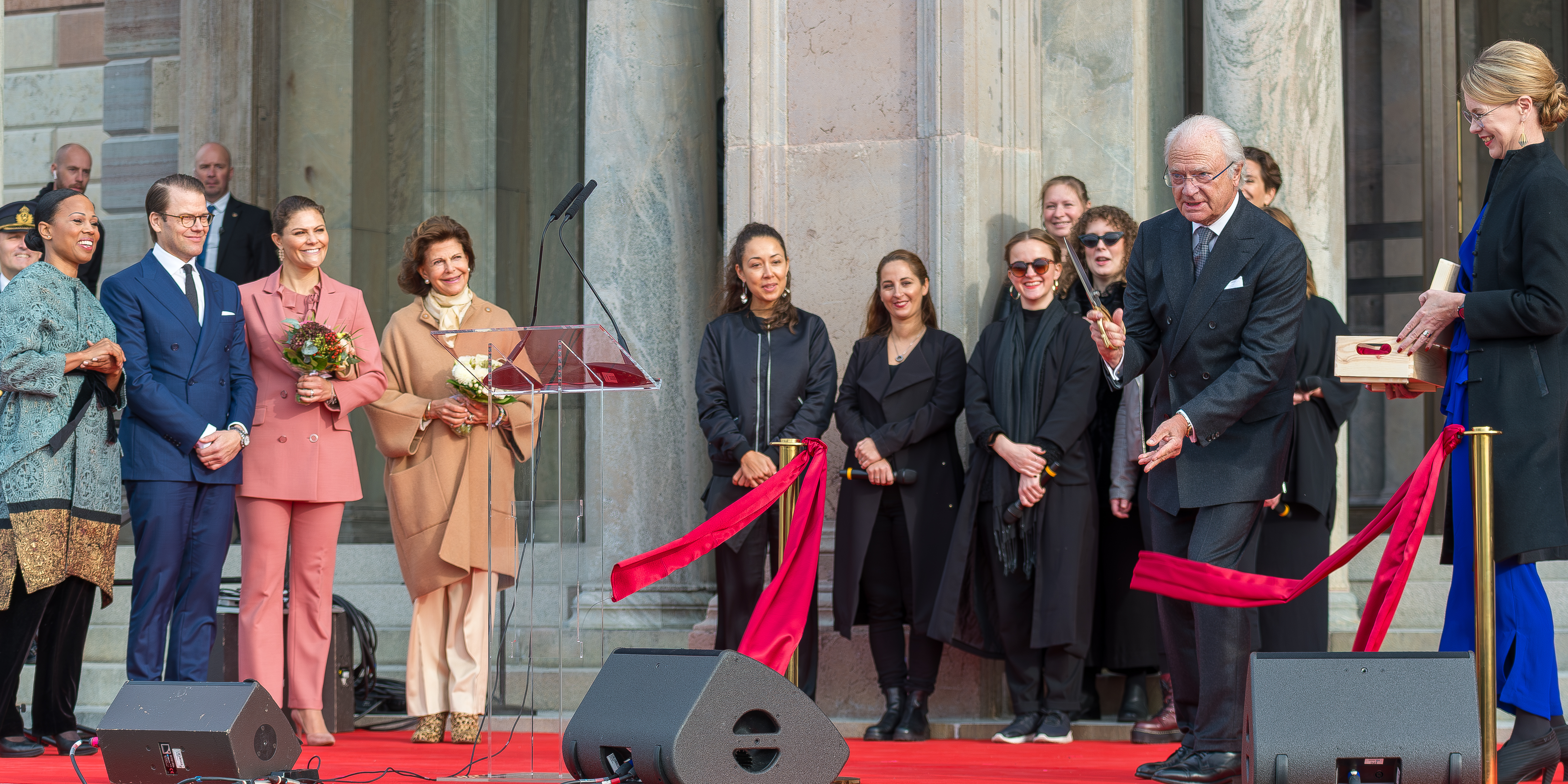 HM Konungen nyinviger Nationalmuseum i Stockholm 2018 i närvaro av HM Drottningen, HKH Kronprinsessan och HKH Prins Daniel, kulturminister Alice Bah Kuhnke, överintendent Susanna Pettersson.